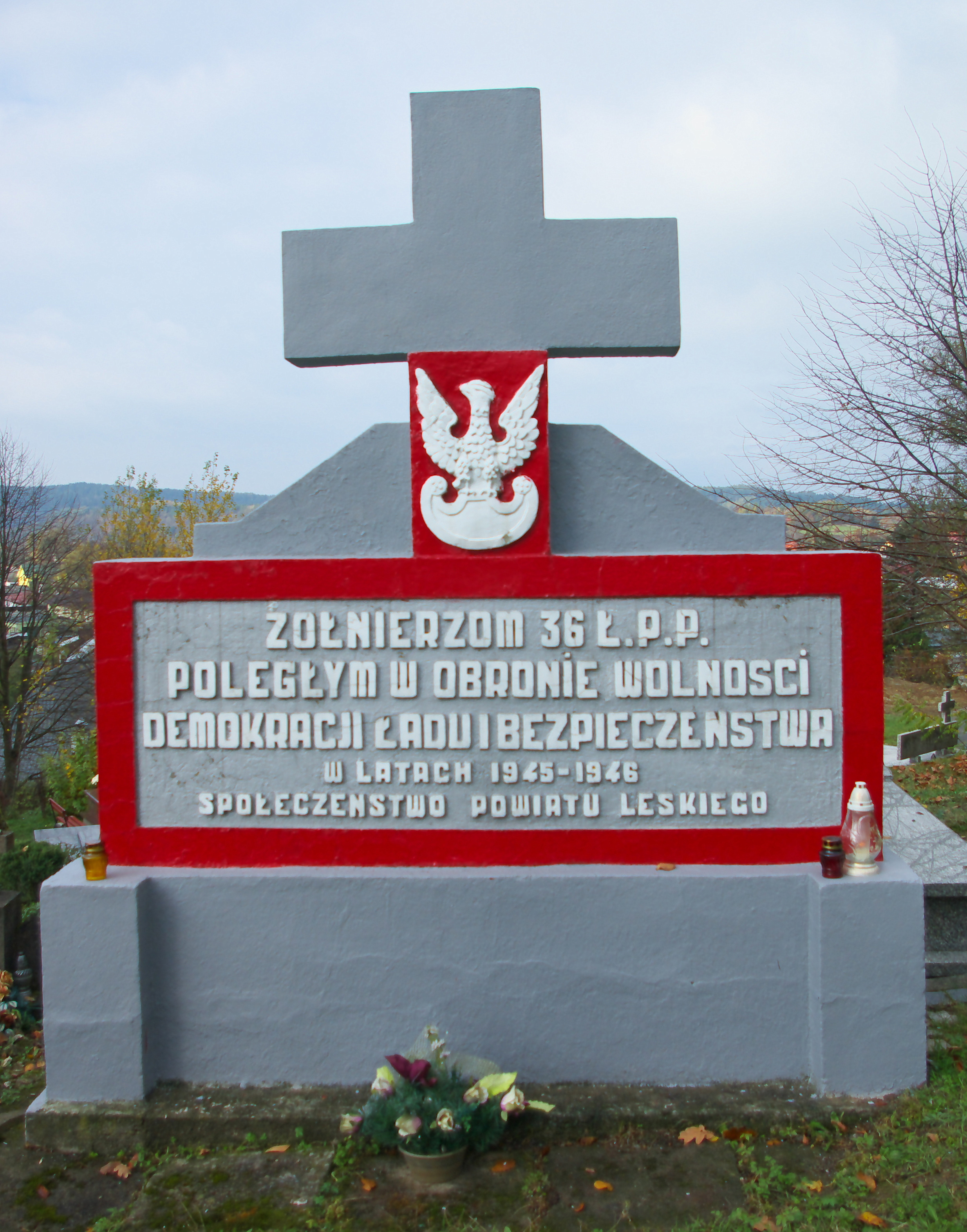 Pomnik żołnierzy poległych w latach 1945-1946 żołnierzy 36 Łużyckiego Pułku Piechoty, ustanowiony na cmentarzu w Lesku (2017).